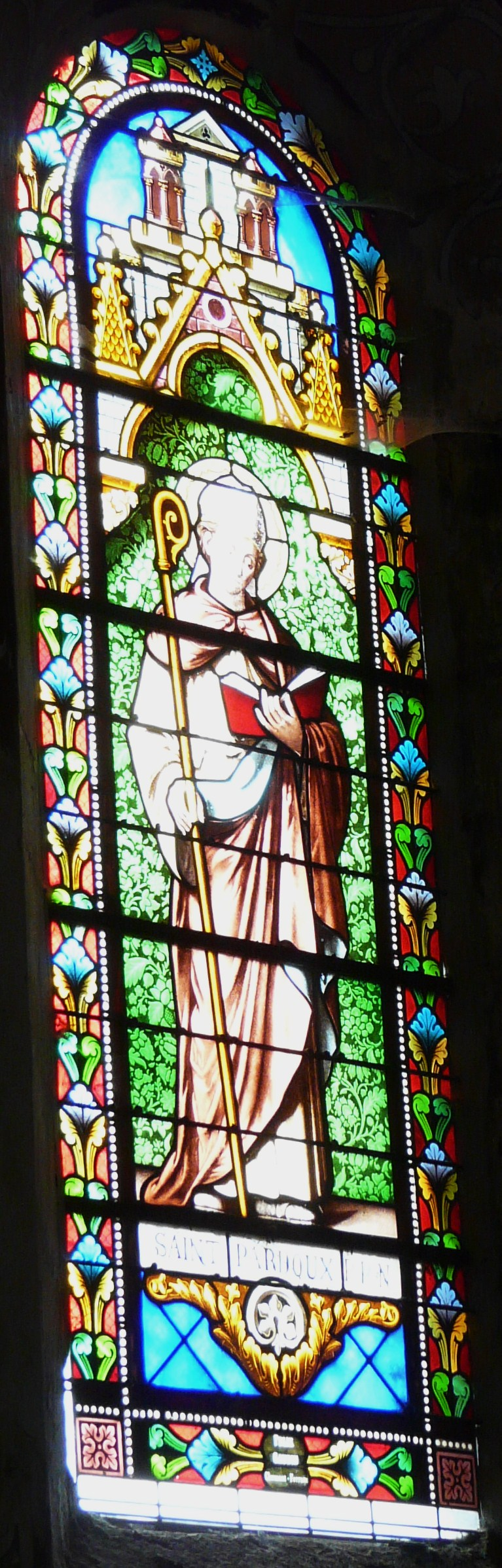 Vitrail représentant saint Pardoux, église Saint-Pardoux, La Tour-d'Auvergne, Puy-de-Dôme, France.